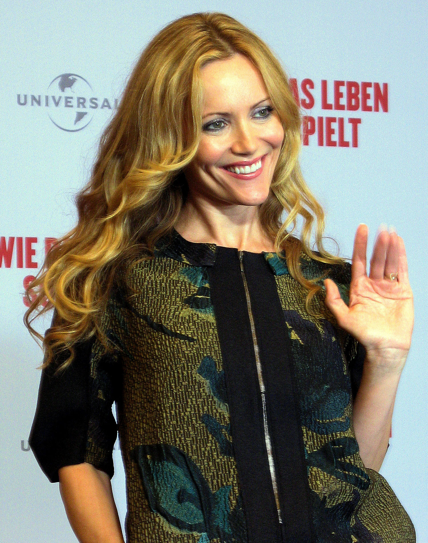 Leslie Mann in Berlin, 26.08.2009